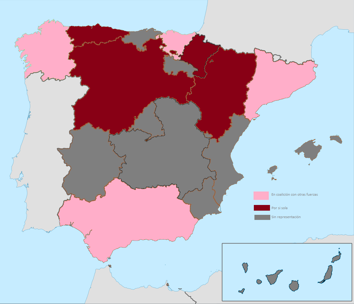 Comunidades autonomas en las que izquierda unida tiene representacion parlamentaria.